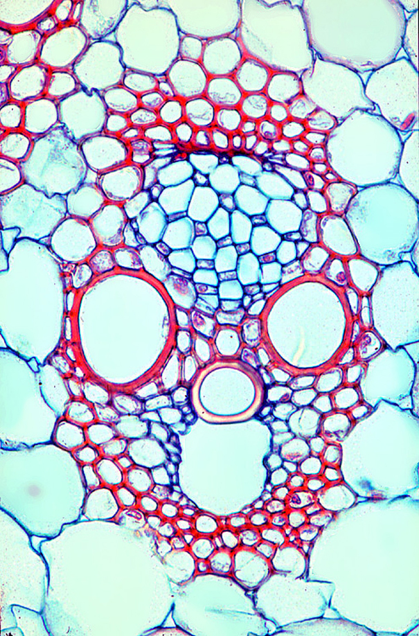 Door parenchym omgeven, gesloten, collaterale vaatbundel in een maisstengel (Zea mays), behorend tot de eenzaadlobbige. Paraffinecoupe met kleuring door astrablauw en safranine. Met de muis kunnen de verschillende elementen aangewezen worden waarna de naam verschijnt.